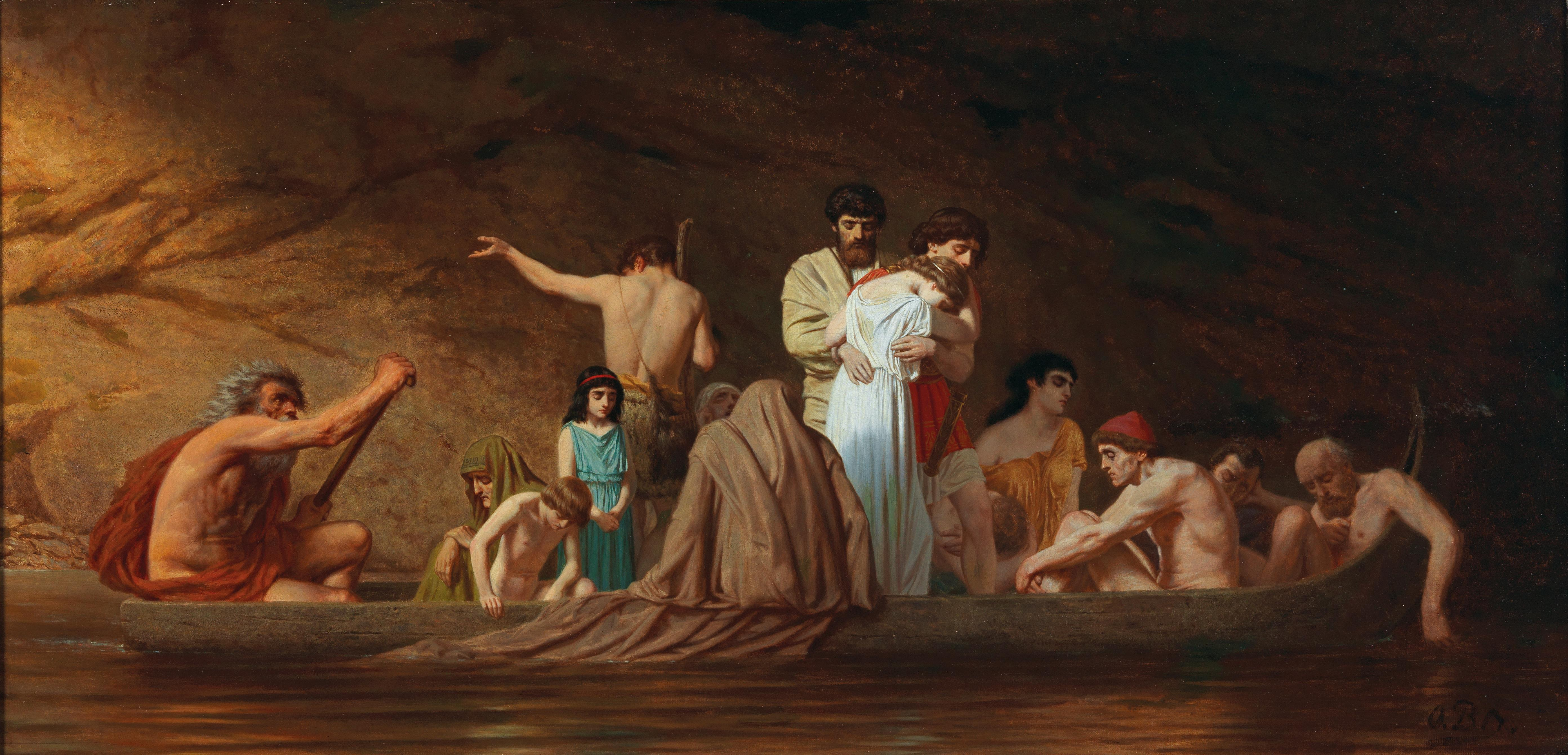 “Die Barke des Charon”, monogrammiert O. B., Öl auf Leinwand, 64 x 129 cm